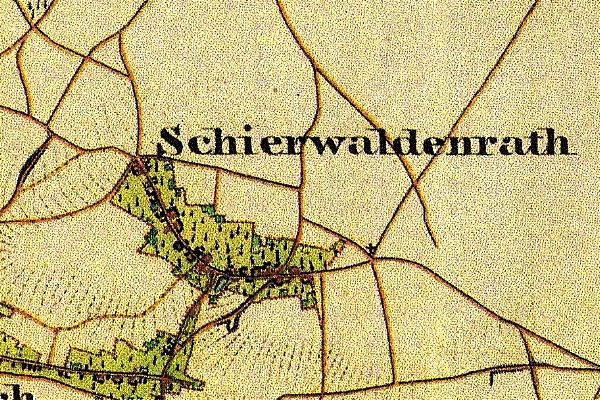 Preußische Kartenaufnahme 1846 -Uraufnahme- (Gangelt)